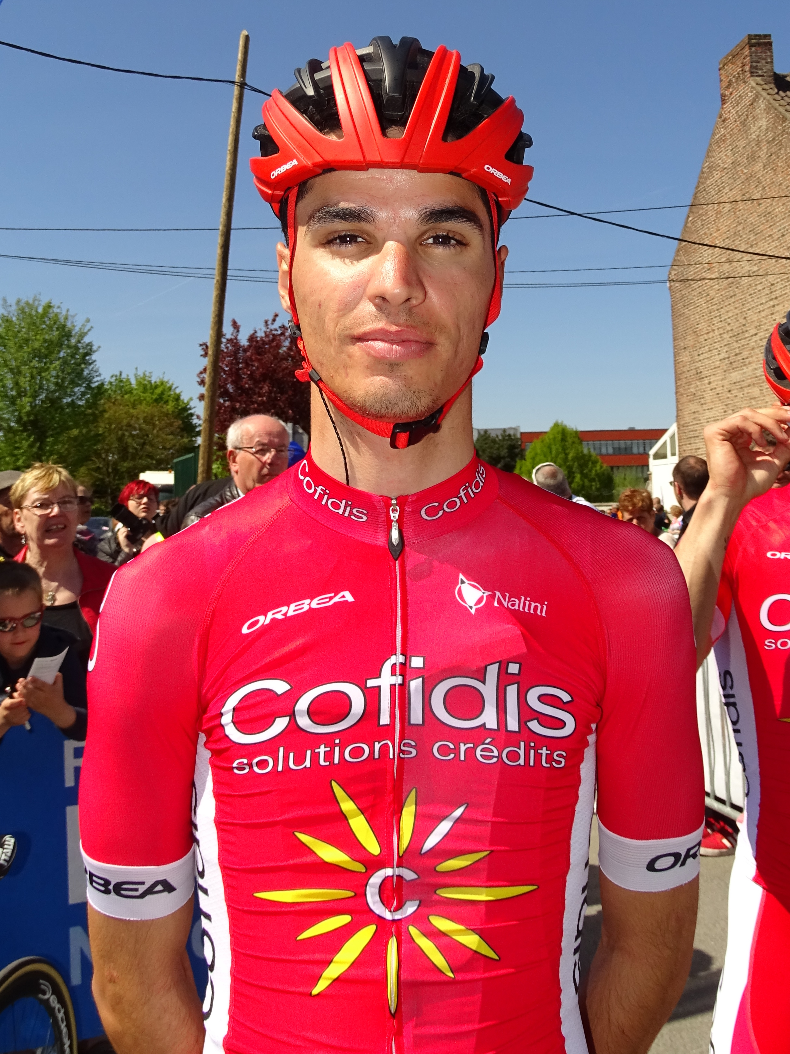 Reportage réalisé le jeudi 5 mai 2016 à l'occasion du départ et de l'arrivée de la deuxième étape des Quatre jours de Dunkerque 2016 à Aniche, Nord, Nord-Pas-de-Calais, France.